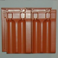 Dachówka marsylka